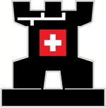 Logo der Festung Furggels